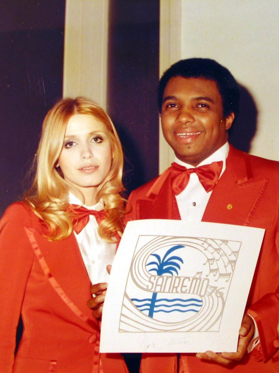 Wess & Dori Ghezzi, secondi classificati al ventiseiesimo festival di Sanremo